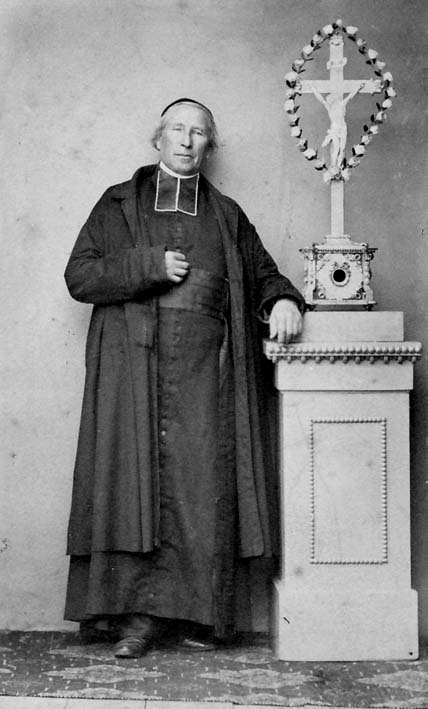 Pfarrer Bernhard Magel, 1795-1863, Neustadt Weinstraße und Rheinzabern, Bistum Speyer